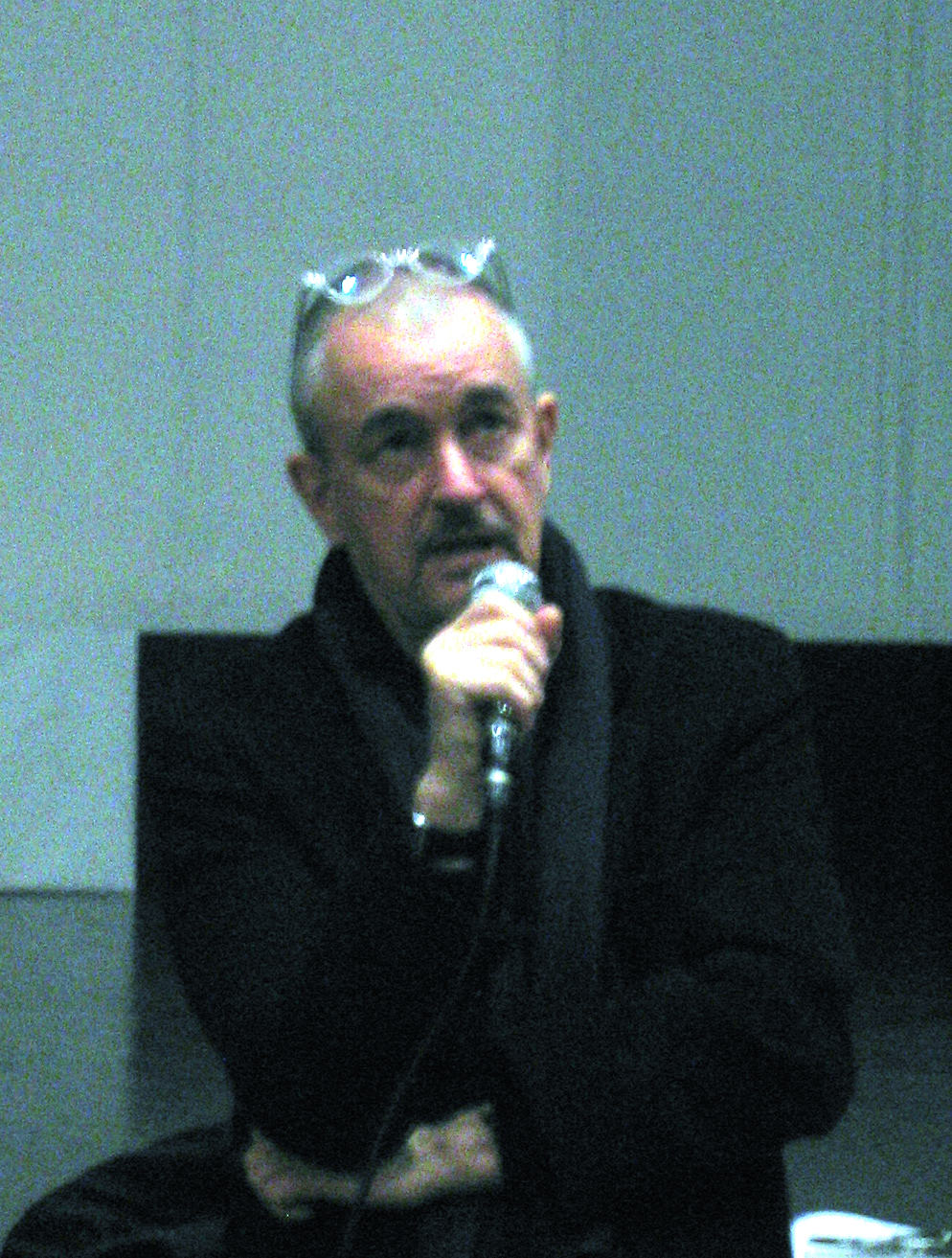 Jean-Jacques Beineix, à Amiens (France) - Le réalisateur est à la "Maison de la Culture" lors du « 26ème Festival international du film d'Amiens » pour un entretien avec le public à l'occasion de la sortie de son ouvrage.